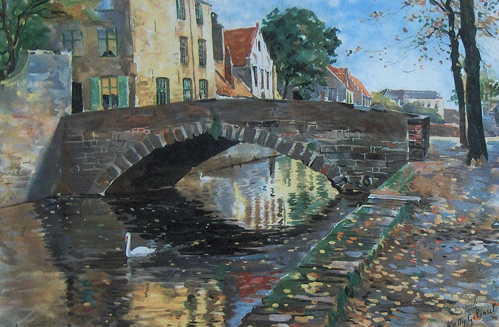 "Brugs reienzicht", by Ketty Gilsoul-Hoppe (1868-1939); privé-bezit